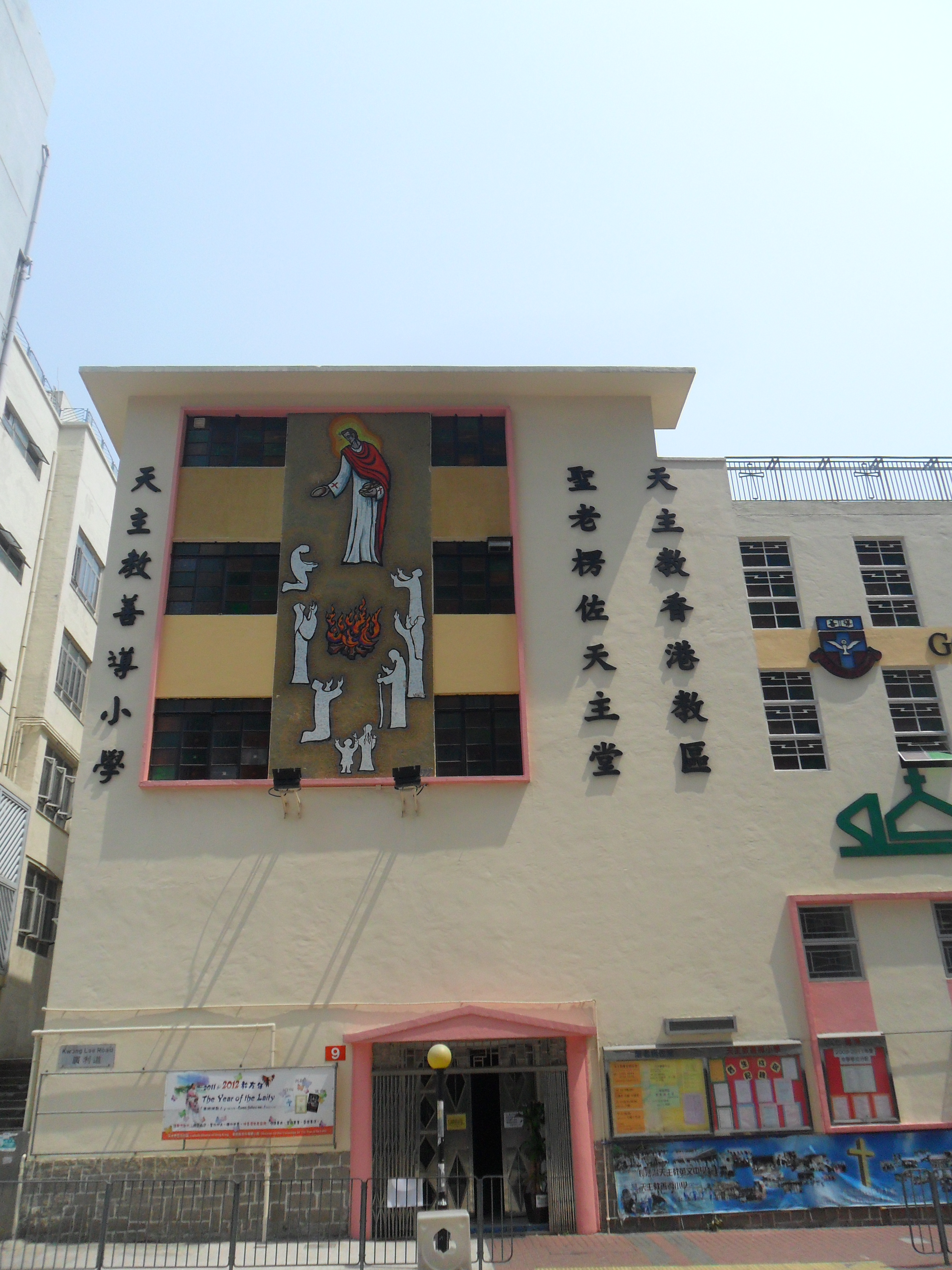 中文（香港）: 聖老楞佐堂, 香港, 中國